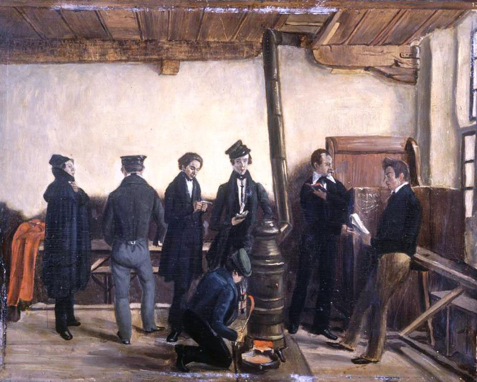 Tafereel van leerlingen in de Latijnse school in Deventer, rond de kachel in het lokaal van de rector tijdens de winter van 1837/1838. V.l.n.r.: P.J. Gerlach Verbeek, M.E. van Delden (rug), W.G. Ribbius, D.H. Hoenebeek Hissink (achter de kachel), E.A. Jordens (naast het katheder), A. Molhuijsen (naast de bank) en H.G. Budde (geknield). De schilder was F. Deeleman, tevens leerling. De school was zoals vrijwel alle Latijnse scholen in die tijd krimpend in leerlingenaantal en zou in 1839 verhuizen naar het Landshuis en in 1848 worden omgevormd tot gymnasium. (Beeldbank Gemeente Deventer (Stadsarchief Deventer))